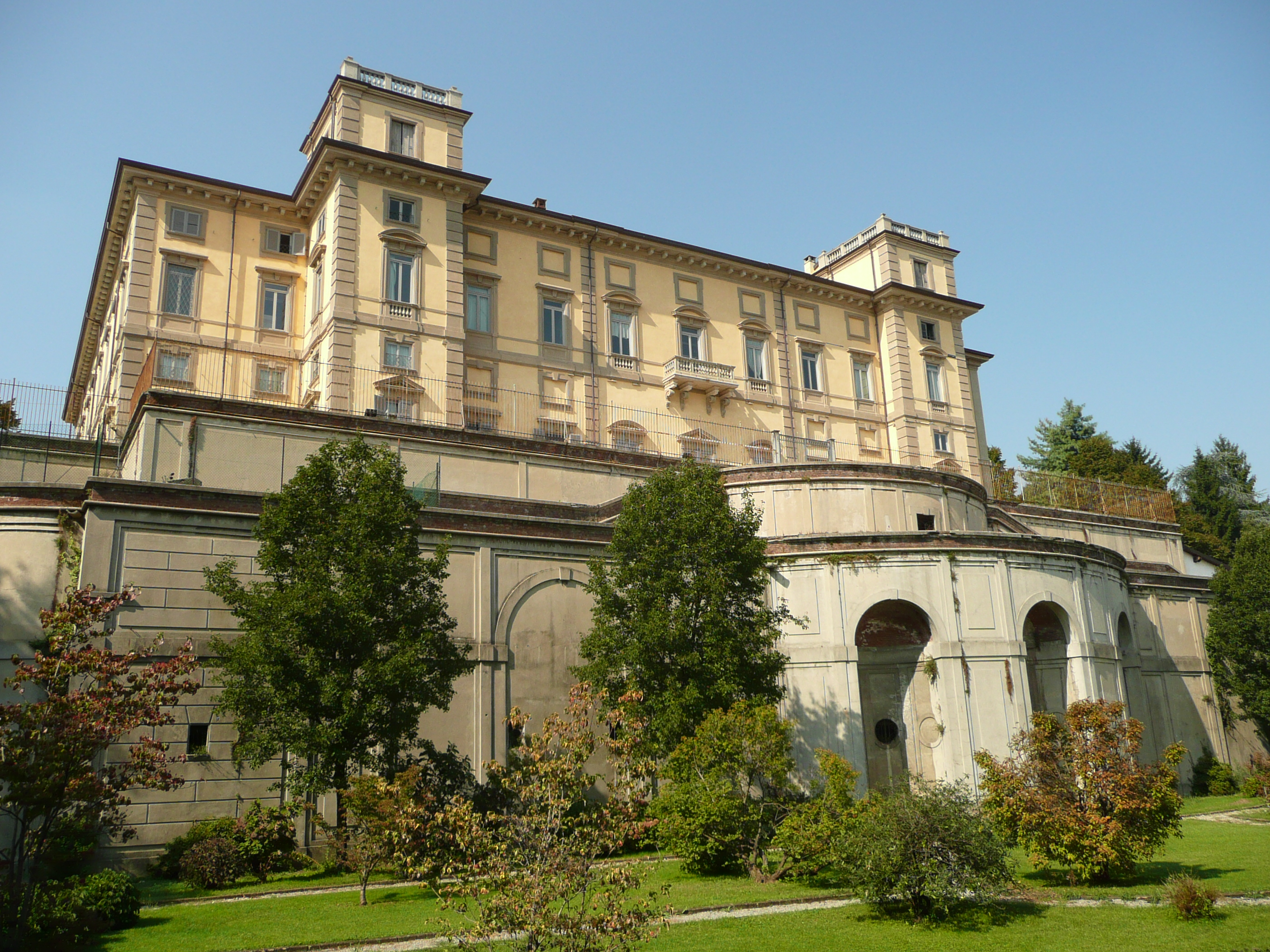 Limbiate, Villa Pusterla Arconati Crivelli - fronte verso il parco